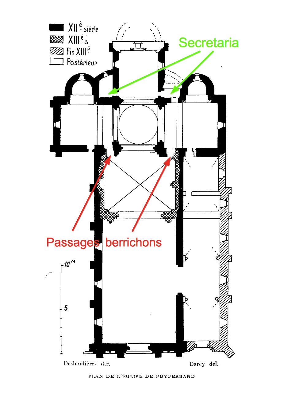 Plan annoté de l'église du Puy-Ferrand, indiquant les "secretaria" et les passages berrichons (Deshoulières 1931)